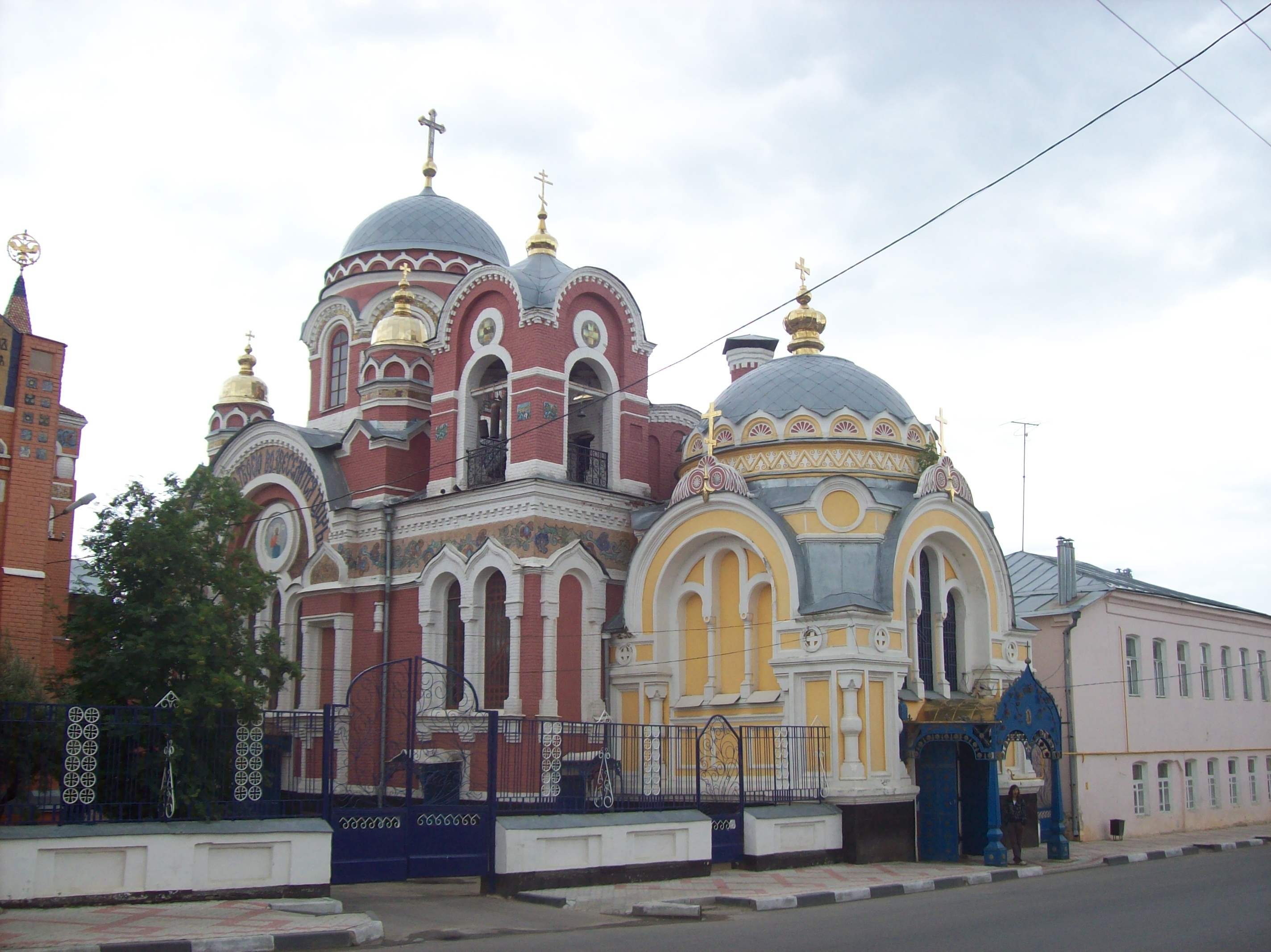 Елец. Великокняжеская церковь